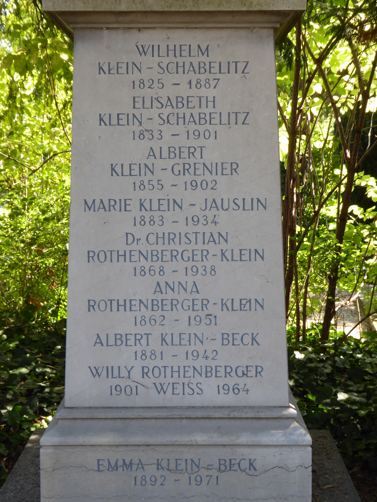 Christian Rothenberger (1868–1939) Richter, Politiker. Familiengrab auf dem Friedhof Wolfgottesacker.